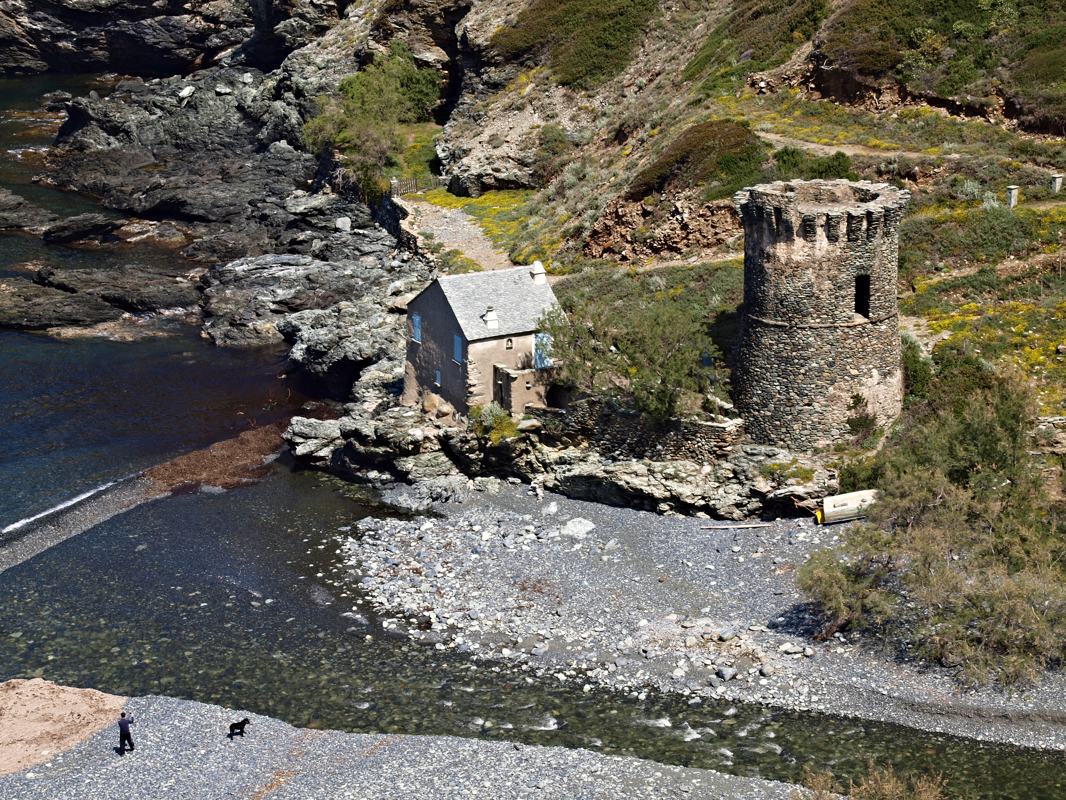 Olmeta-di-Capocorso (Corsica) - Tour de Negru